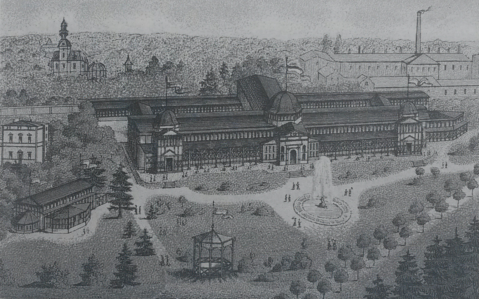 Gelände der Hessische Landesgewerbeausstellung 1879 in Offenbach